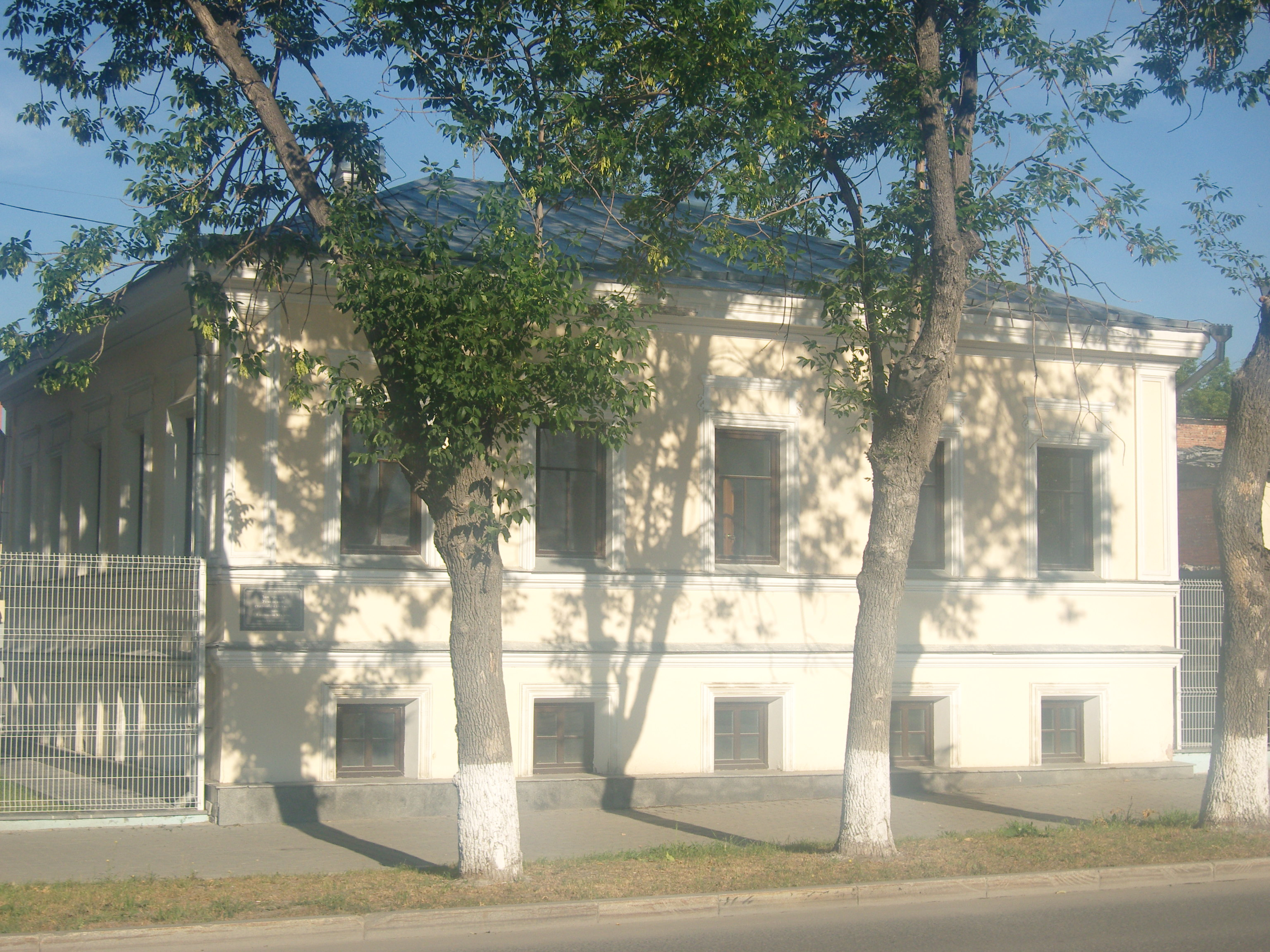 Улица Добролюбова (Екатеринбург)